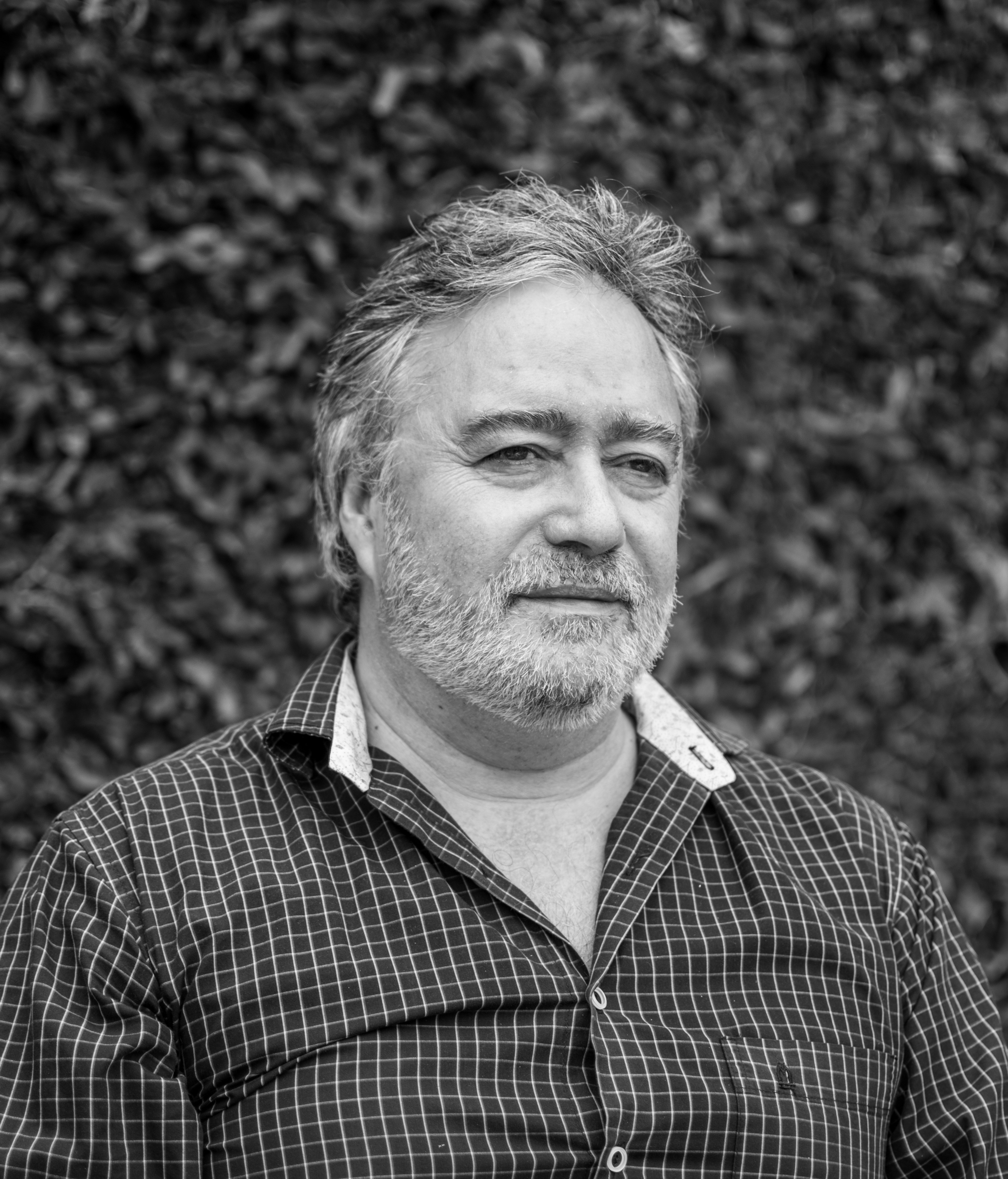 Pablo Cazaux, Escritor